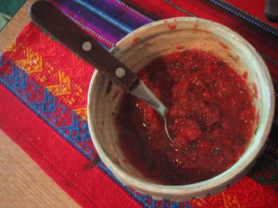 Llajua.. una salsa picante tradicional Boliviana